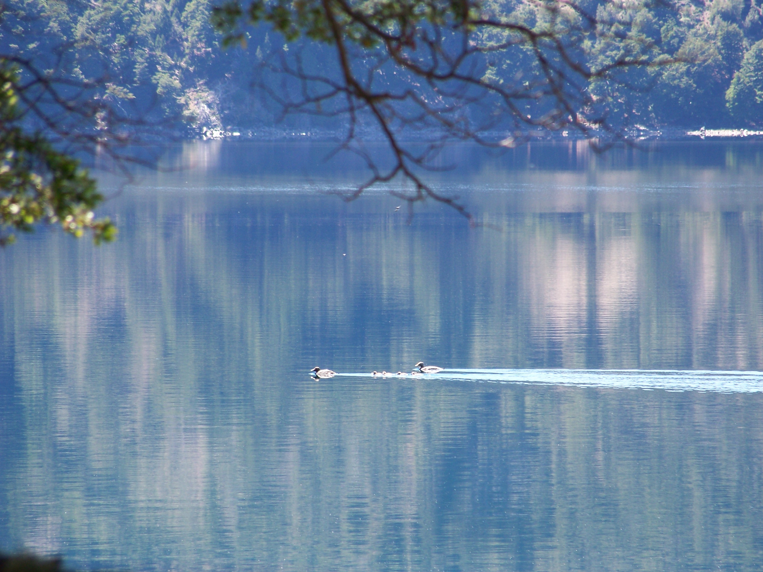 Abutardas navegando en el Lago Moquehue